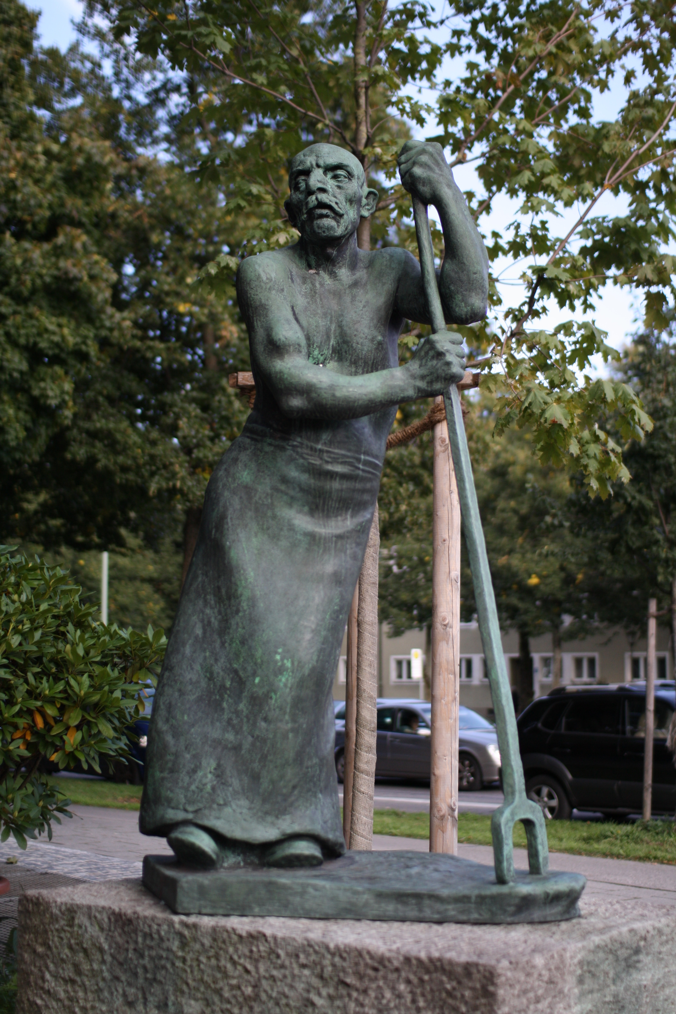 "Blockwalzer", 1929 von Fritz Koelle